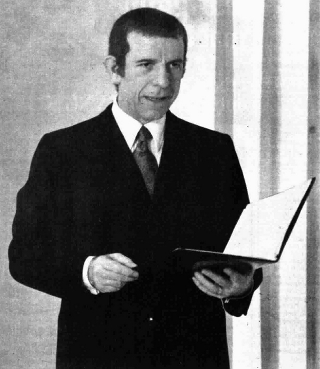 Italian actor Enzo Tarascio